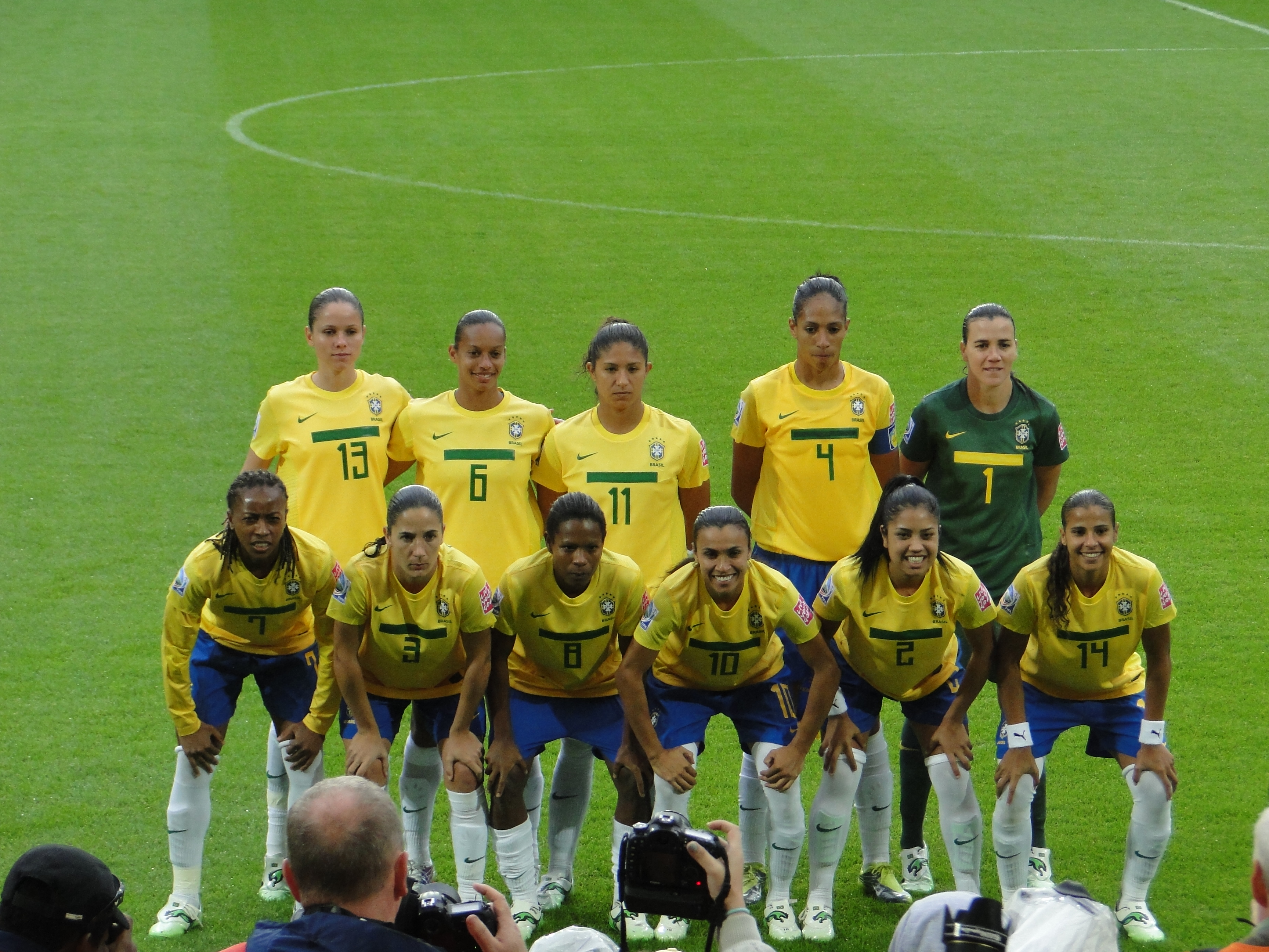 Time titular do jogo Brasil x Noruega, disputado em 03/07/2011, em Wolfsburg, Alemanha, na Volkswagen Arena, em partida válida pela Copa do Mundo Feminina de 2011, contra a Noruega.